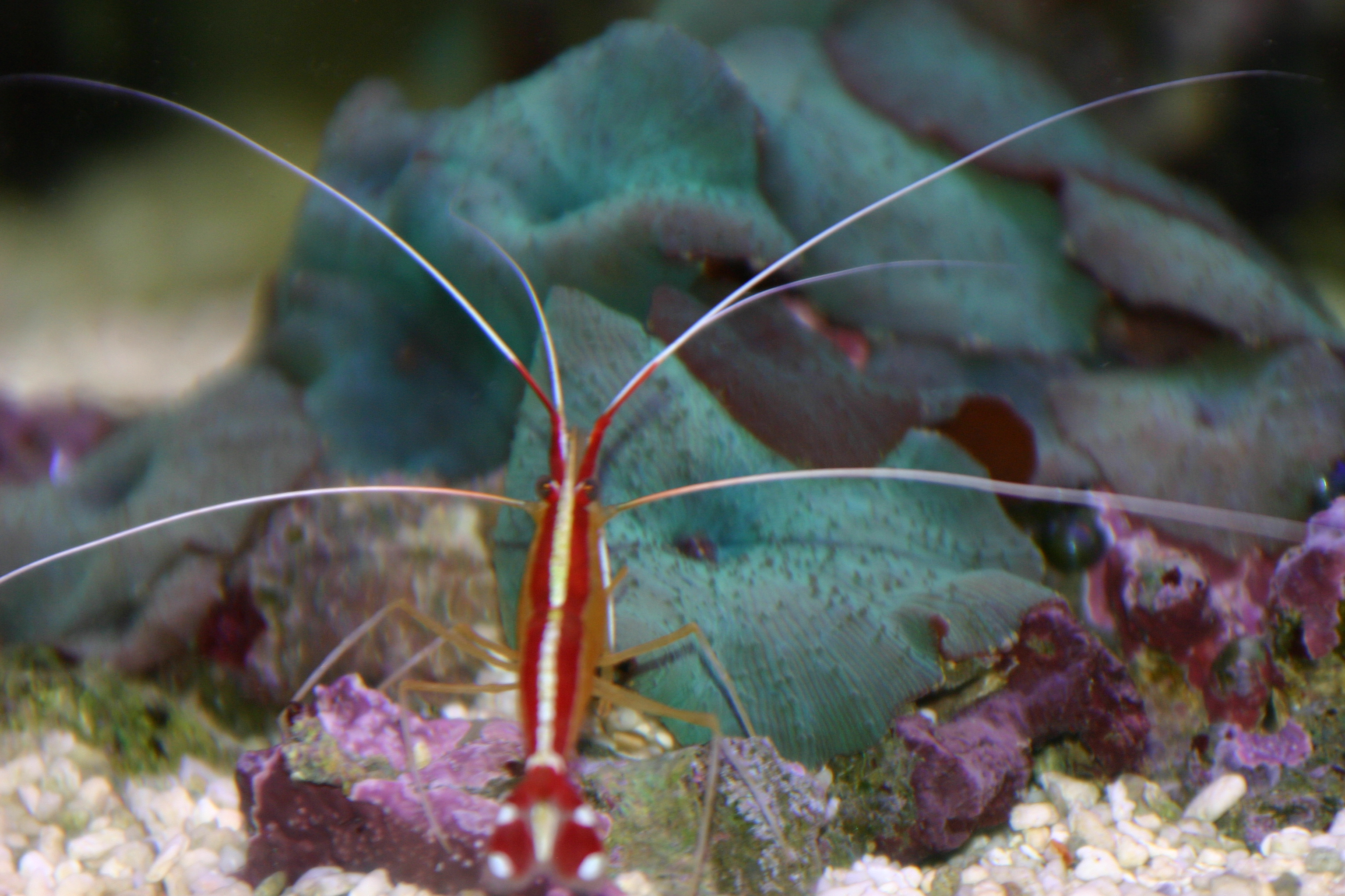 Gamba limpiadora Lysmata Amboinensis frente a colonia de Discosomas